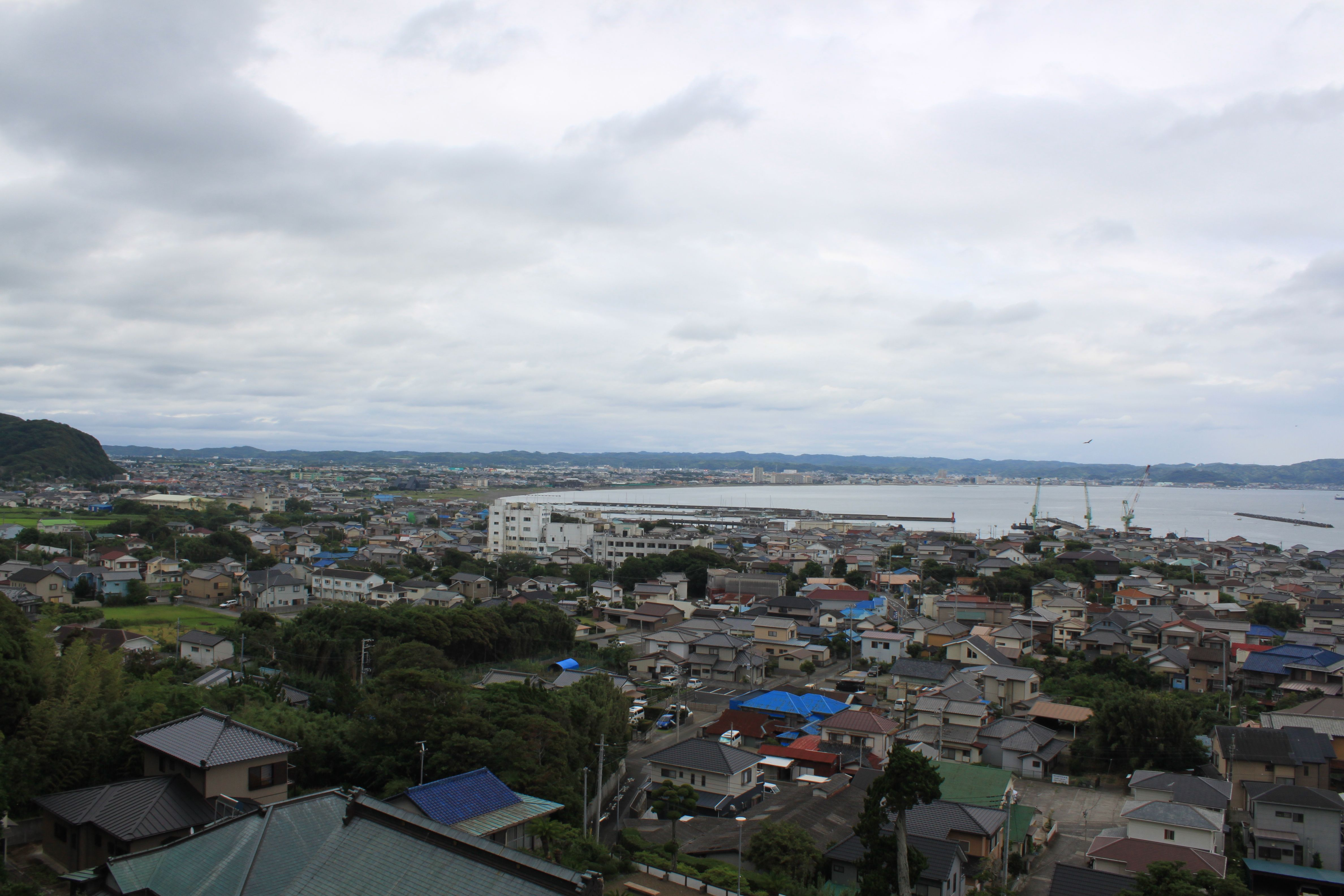 大福寺からの風景